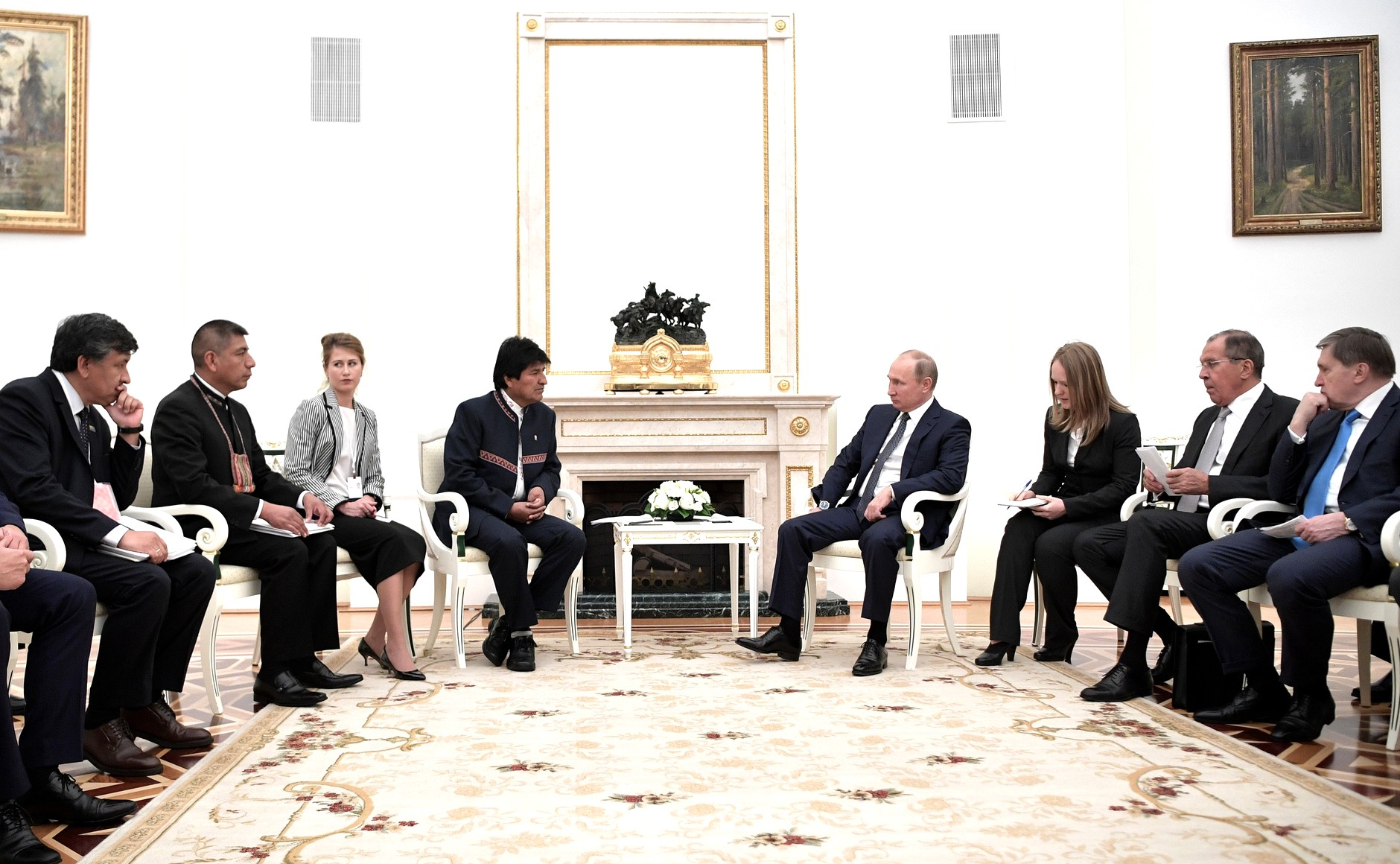 Встреча Президента России Владимира Путина с Президентом Многонационального Государства Боливия Эво Моралесом